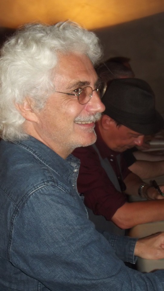 Kristof Serrand au festival international d'animation d'Annecy 2019.